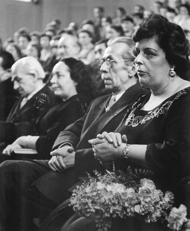 Berlin, Verleihung Heinrich-Mann-Preis an Jobst Zentralbild Weiß 27.3.1958 "Heinrich-Mann-Preis" verliehen In einer öffentlichen Plenarsitzung der Deutschen Akademie der Künste in Berlin wurde am 27.3.1958 vom Präsidenten der Akademie, Prof. Otto Nagel, der "Heinrich-Mann-Preis" für schriftstellerische Arbeiten verliehen. Frau Leonie Mann-Askenary, die Tochter des Dichters wohnte der Sitzung bei. UBz: Frau Leonie Mann-Askenary unter den Gästen. Dahinter Prof. Otto Nagel. [Berlin.- Preisverleihung in AdK, 1. Reihe vlnr: Hans Grundig, Lea Grundig, Otto Nagel, Leonie Mann-Askenazy] Abgebildete Personen: Nagel, Otto Prof.: Maler, Präsident der Akademie der Künste (AdK), Nationalpreisträger, Vaterländischer Verdienstorden (VVO) in Gold, DDR (GND 118586300) Grundig, Hans Prof.: Maler, Grafiker, DDR Grundig, Lea Prof.: Malerin, Grafikerin, DDR (GND 118542982) Askenazy-Mann, Leonie: Tochter von Heinrich Mann